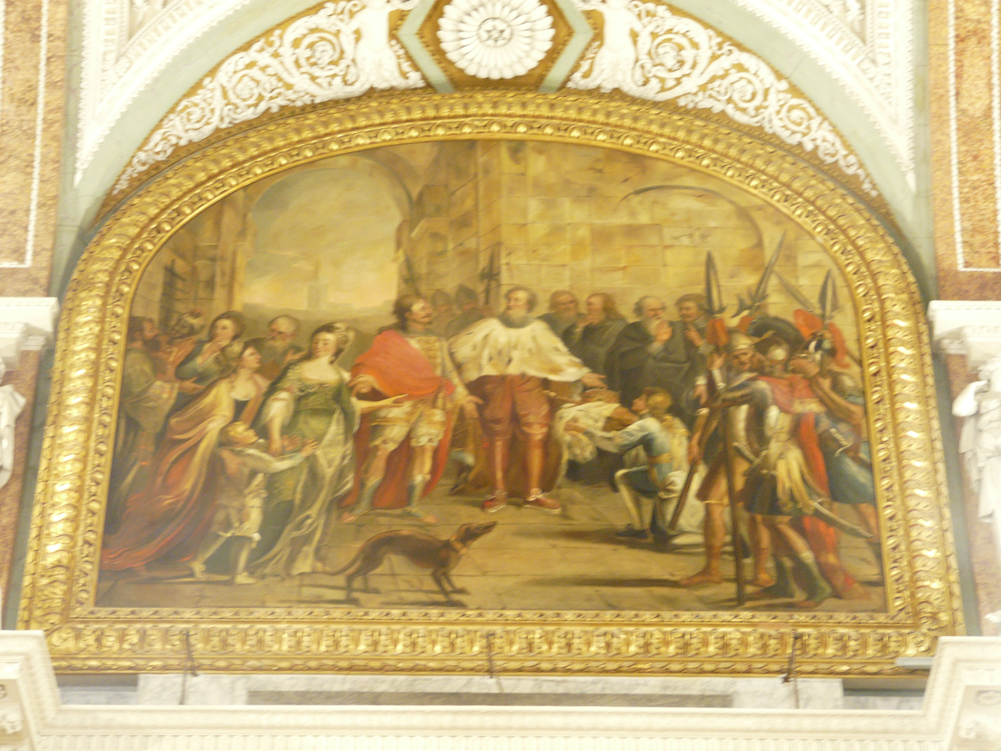 Sala del Maggior Consiglio, Palazzo Ducale, Genova, Liguria, Italia